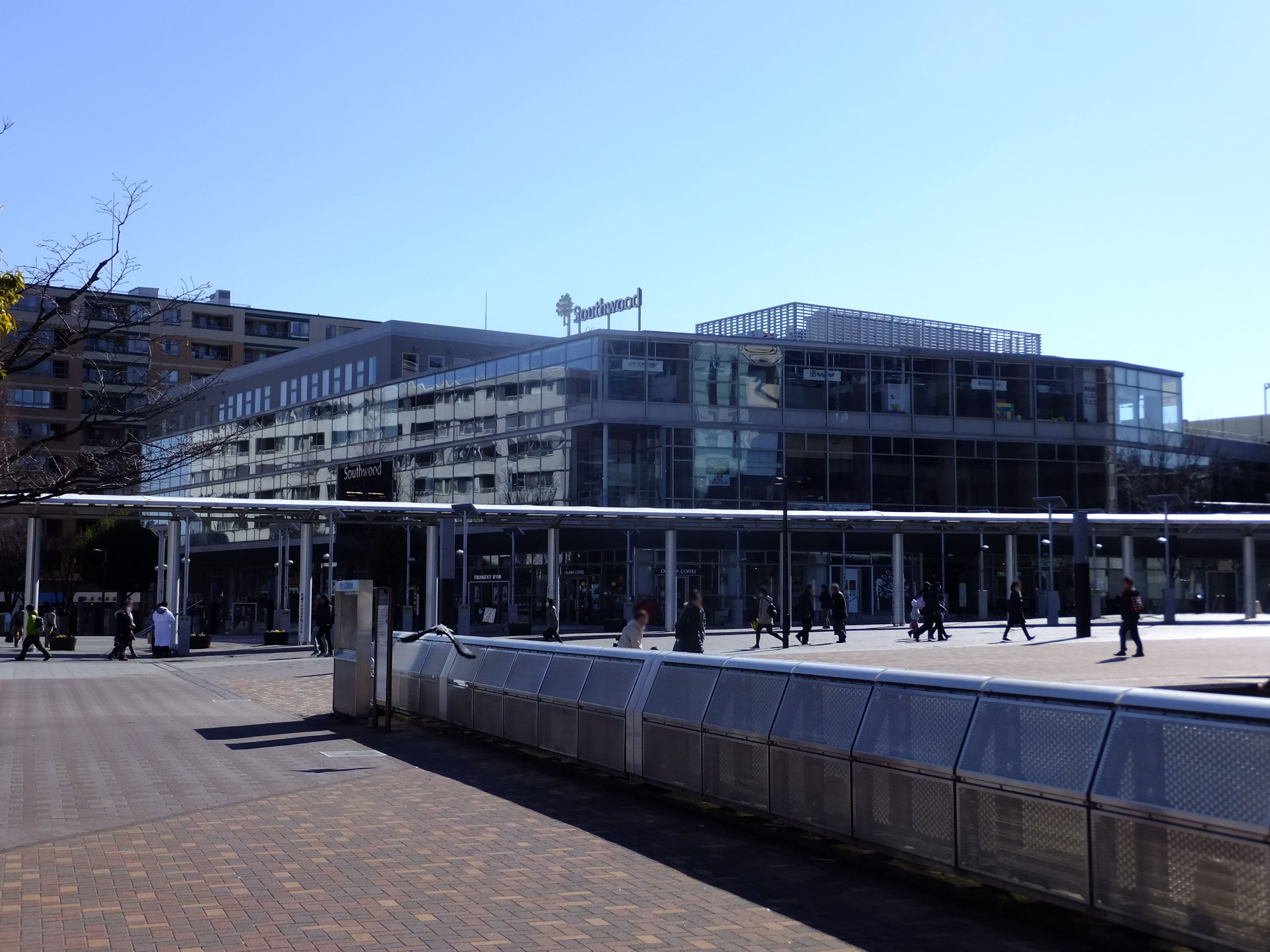 横浜市都筑区のショッピングモール、サウスウッド。国内初となる耐火木造の大型商業施設である。